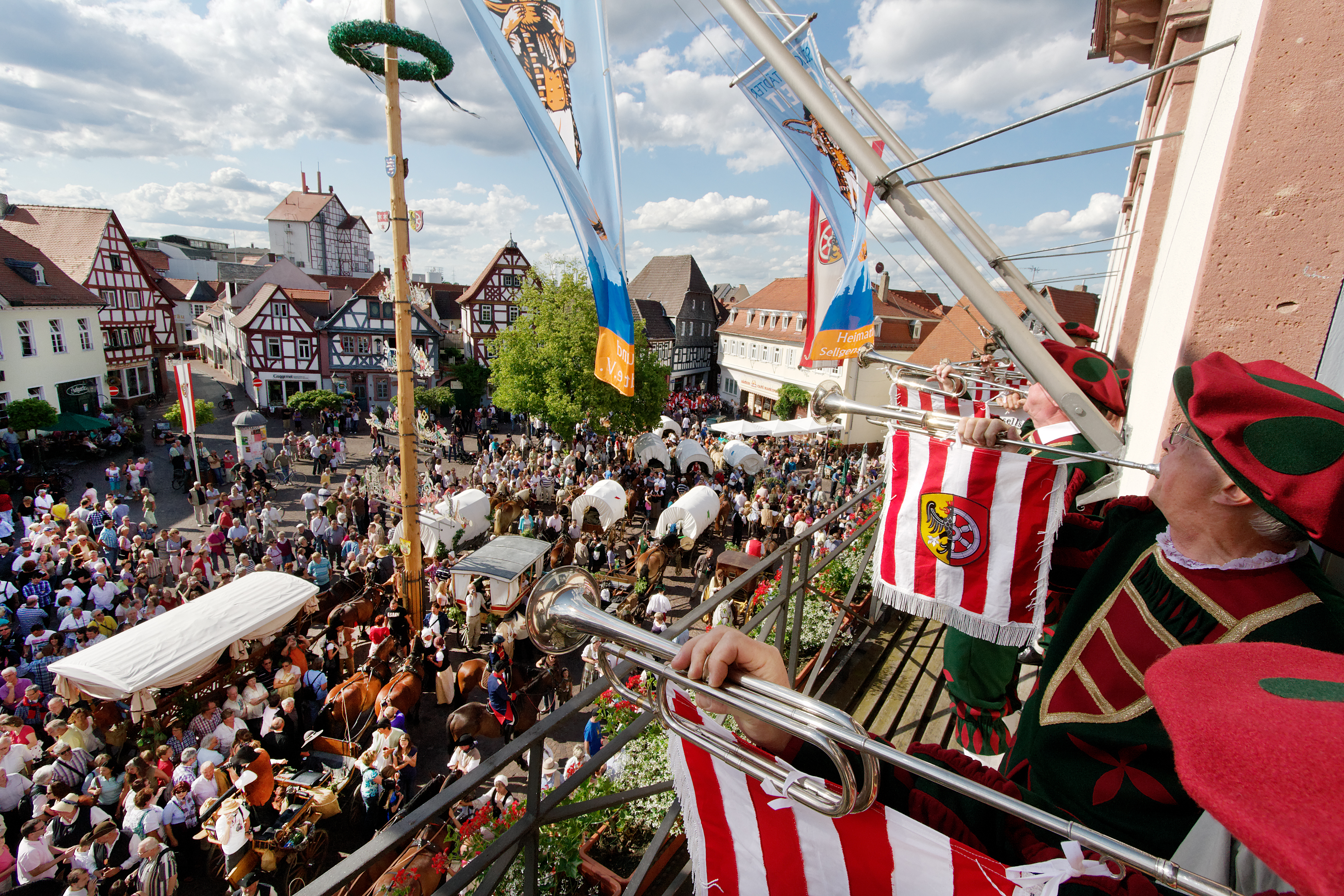 Geleitsfest in Seligenstadt (Hessen): Ankunft der Kaufmannszüge aus Augsburg und Nürnberg auf dem Marktplatz.